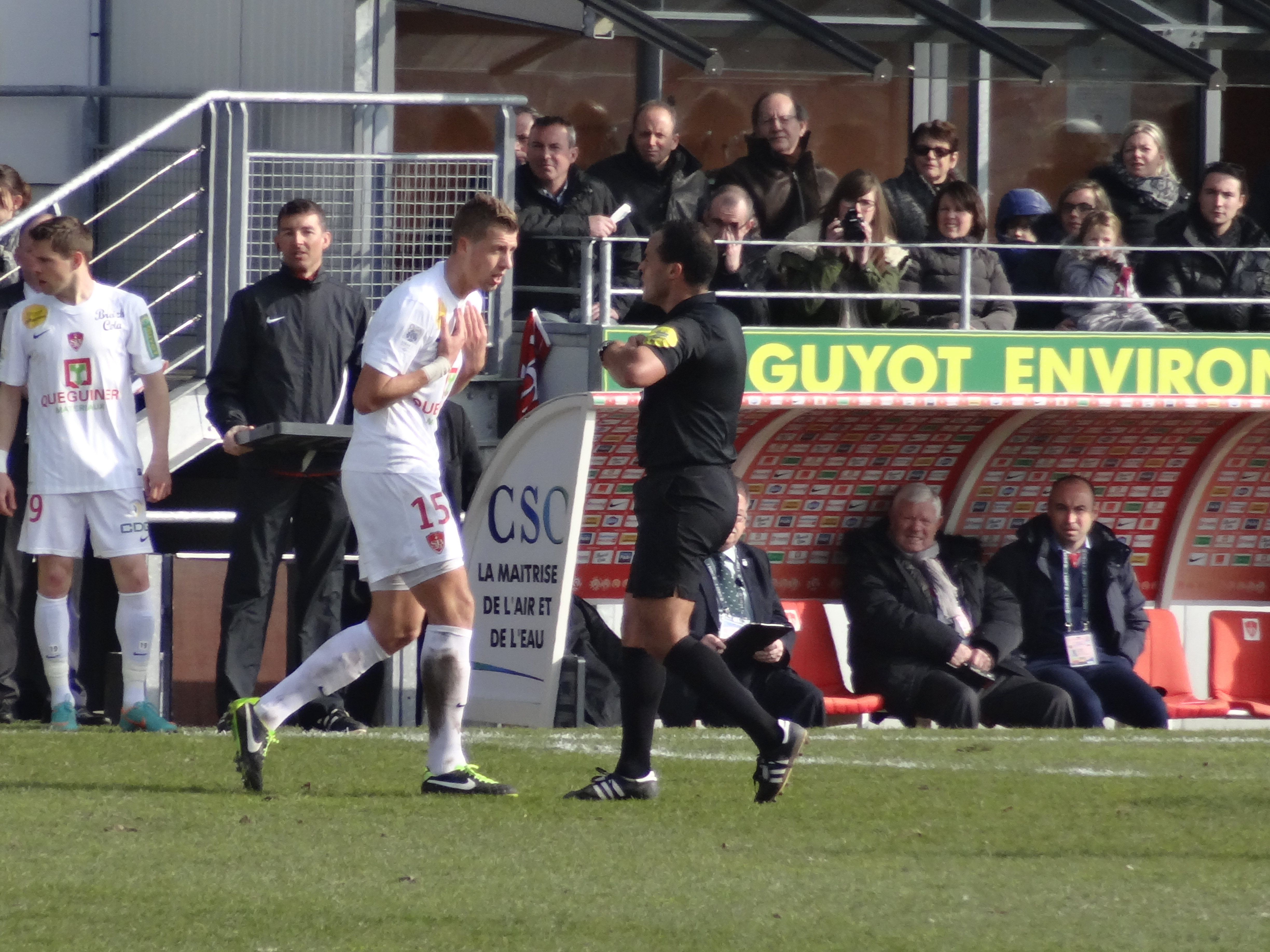 Match de football (Ligue 1) entre le Stade brestois 29 et l'Olympique lyonnais, le 3 mars 2013